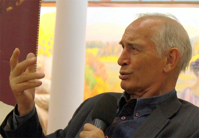 Vasily Lanovoy